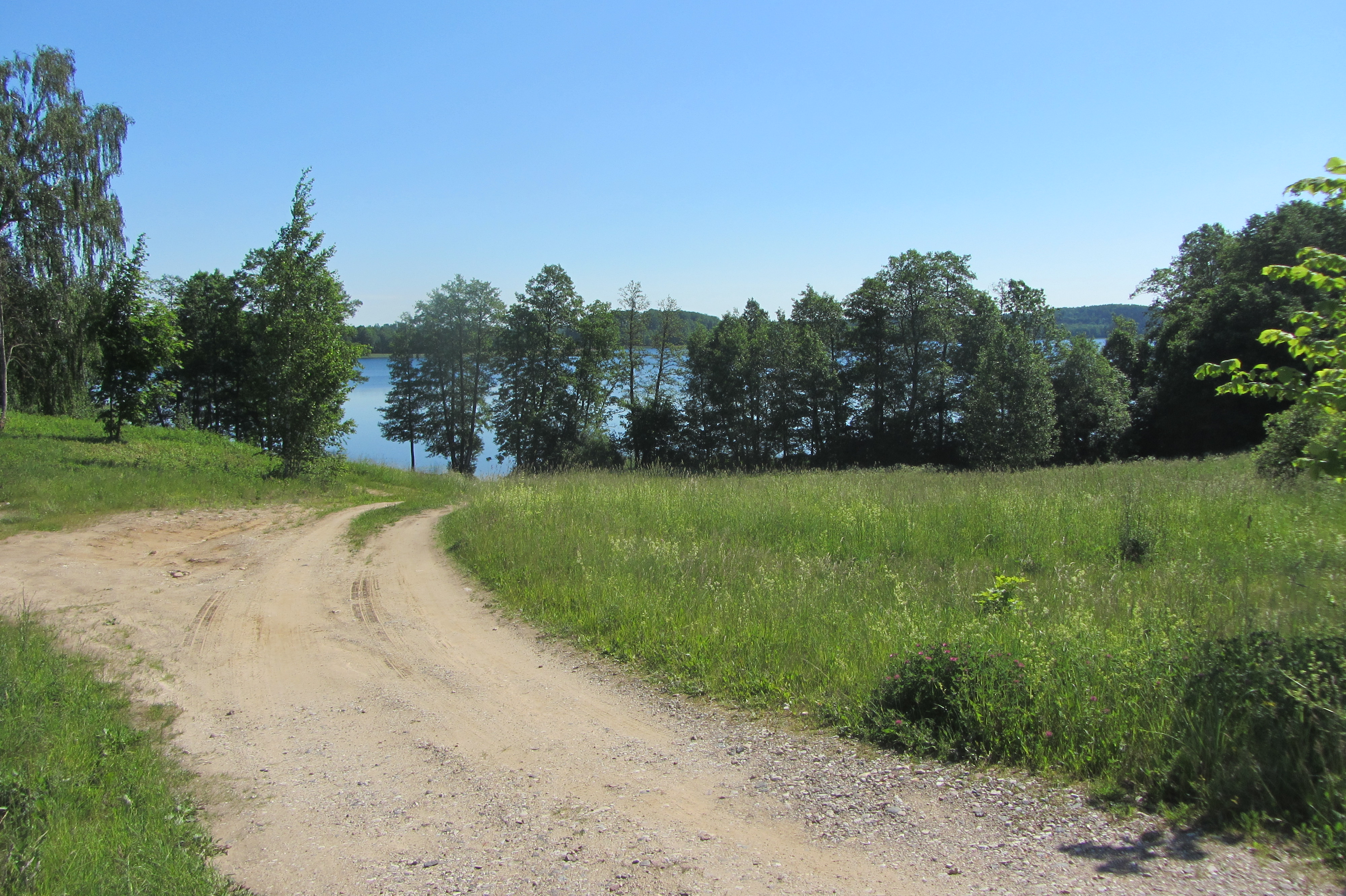 Antazavės sen., Lithuania